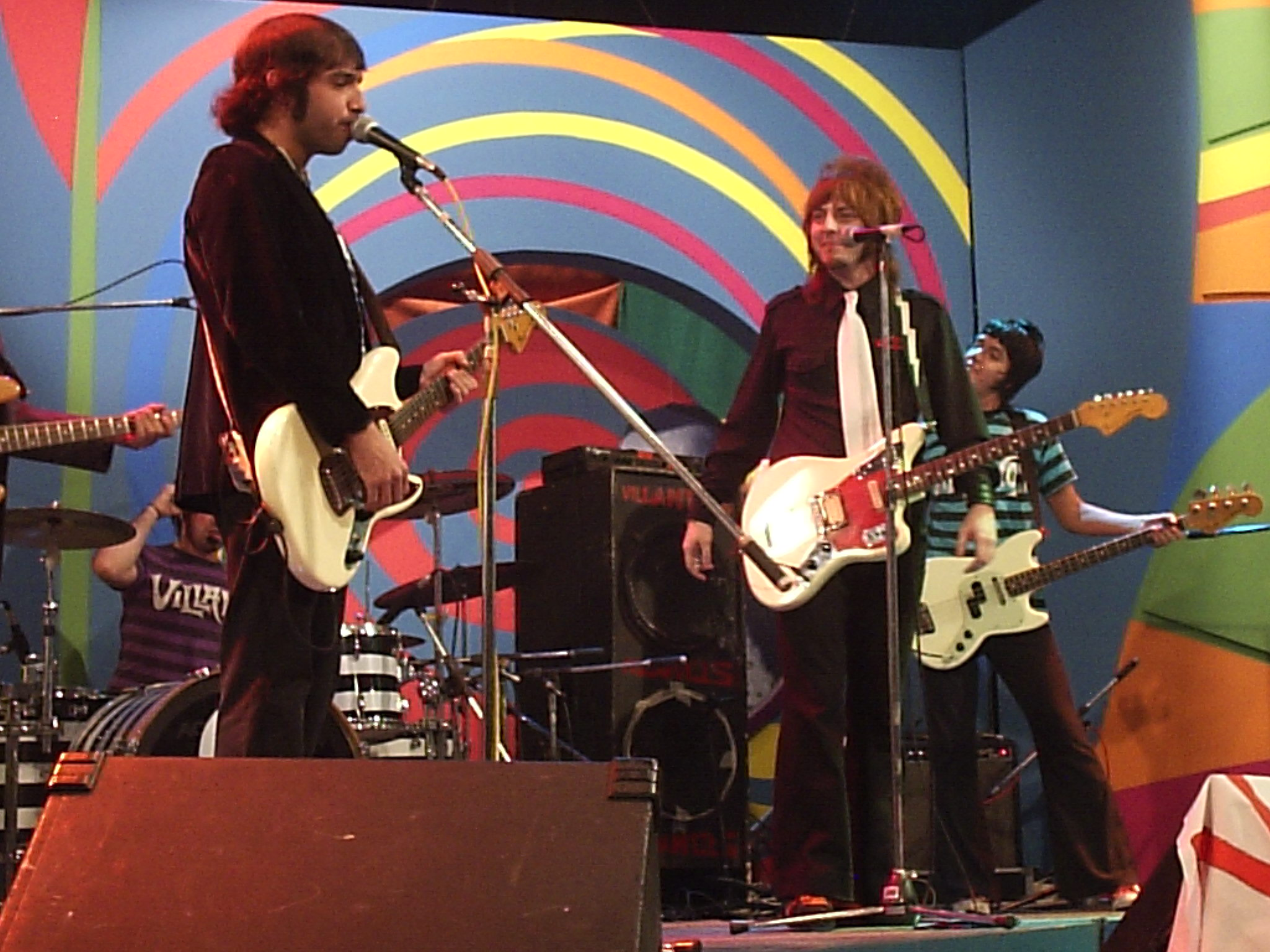 Villanos en canal 7 , Buenos Aires, Argentina